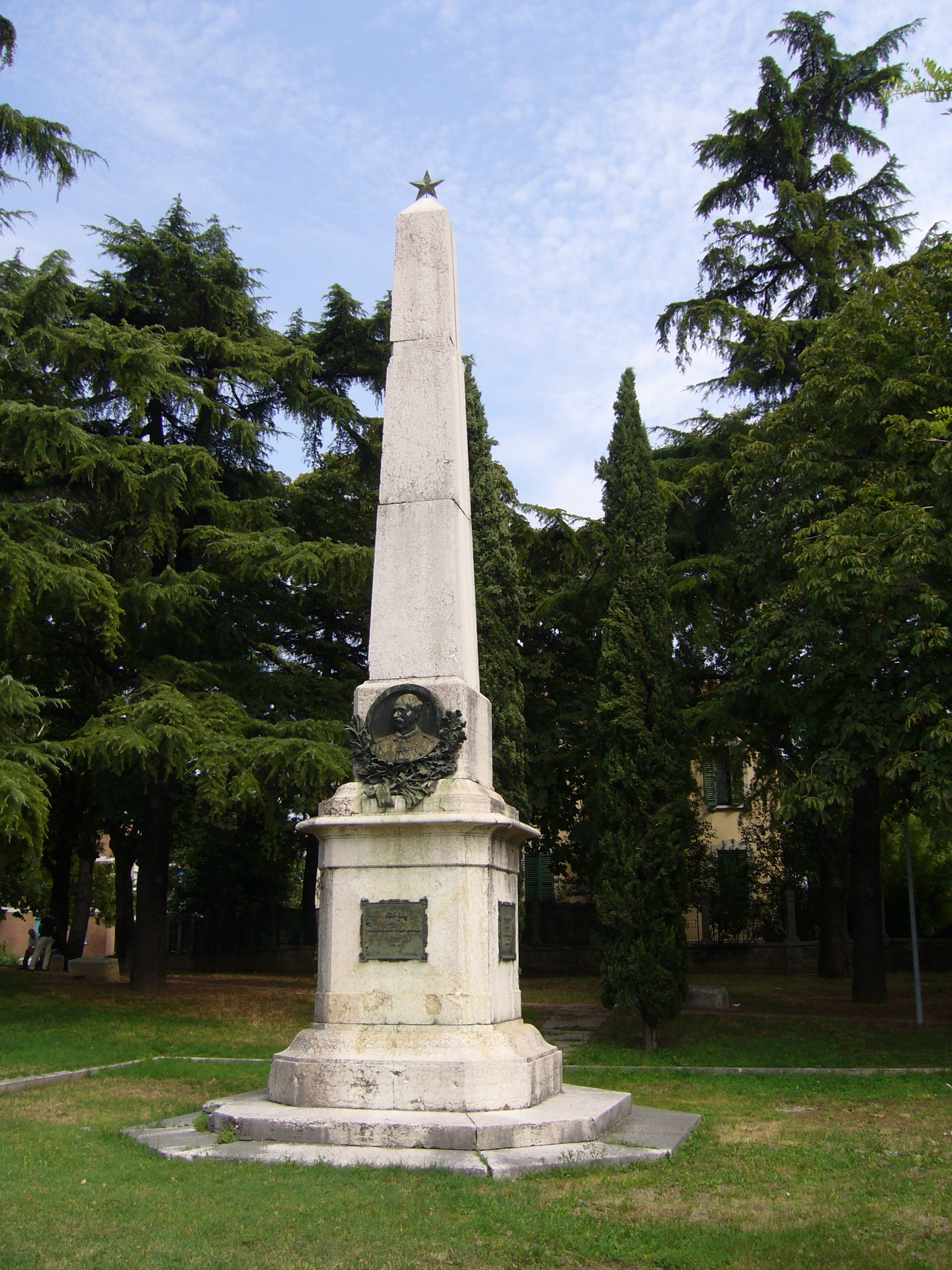 monumento in ricordo del generale Giuseppe Salvatore Pianell (1818-1892) posto nei giardini di via Piave a Verona